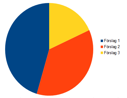 Skapad i Open Office 4.1.1